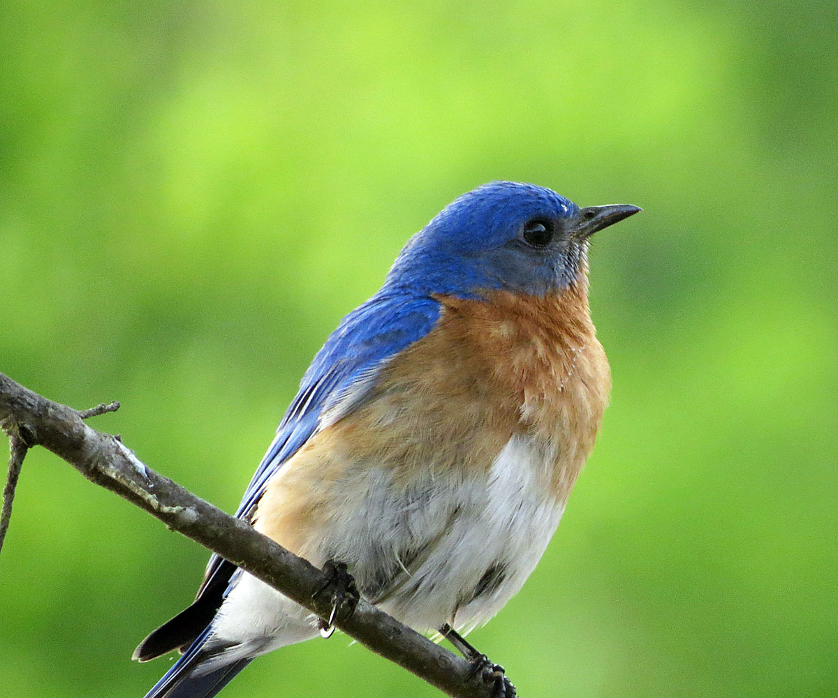 Eastern Bluebird